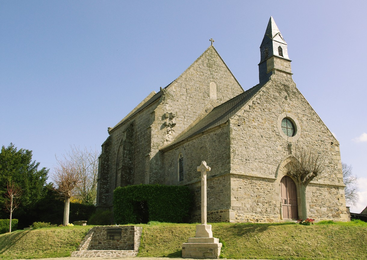 La chapelle Notre-Dame-de-Hirel, dans les Côtes d'Armor, en 2012.